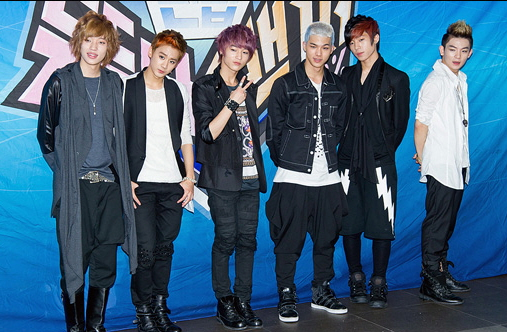 SBS MTV 틴탑의 뜬다 백퍼(100%) 제작 발표회에 참가한 앤디